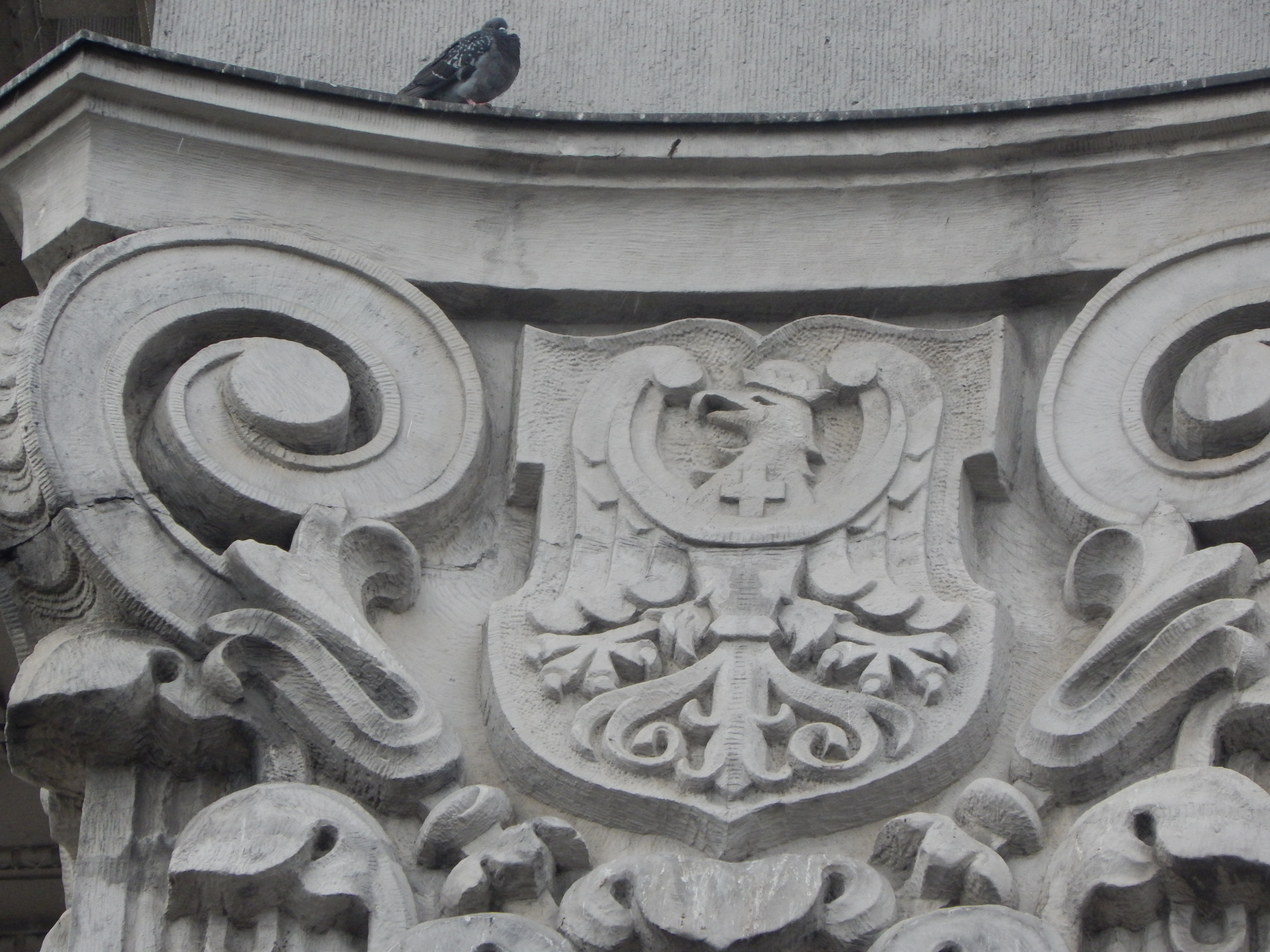 Fragment elewacji gmachu Sejmu Śląskiego - herb Pszczyny